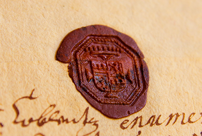 Siegel vonHeinrich Freiherr von Reuschenberg zu Setterich